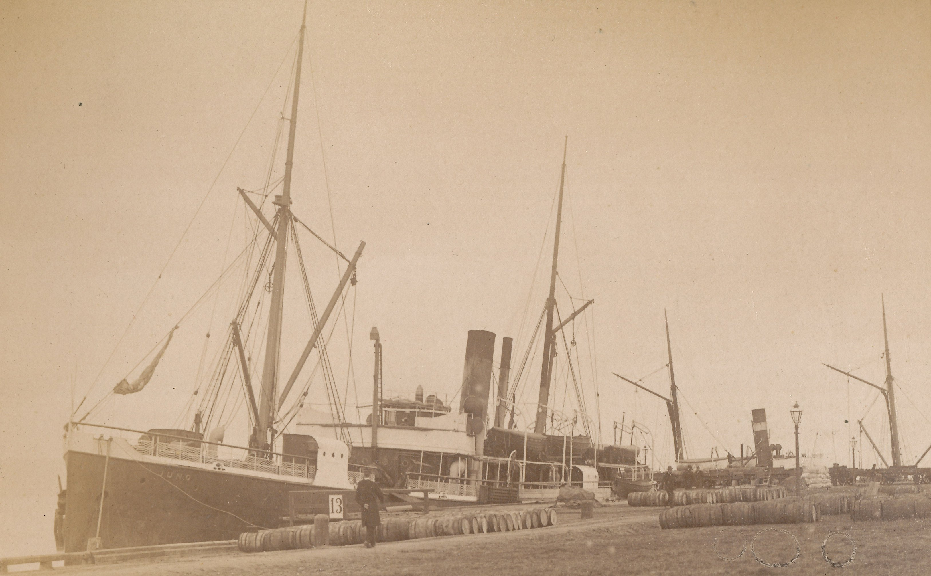 Format: Fotopositiv Dato / Date: 1893 Fotograf / Photographer: Jørgen Wickstrøm Sted / Place: Brattøra, Trondheim Lenke / Link: Se diskusjonen rundt de to fotografene Johan Erik Wickstrøm og Jørgen Johan Brock Wickstrøm (Preus Museum) Litteratur: Trondhjemske Samlinger: 1893 - et år i Trondhjem. Bilder av Jørgen Wickstrøm (Trondheim 2001) Eier / Owner Institution: Trondheim byarkiv, The Municipal Archives of Trondheim Arkivreferanse / Archive reference: Tor.H40.B24.F1584 [T0003] Trondheim havn, Kai 13. Wilsonslinjens "Juno" gikk i fart mellom Hull i England og Trondheim. John West Wilson (1816 - 1889) var sønn av grunnlegeren av det store Wilsonrederiet som etter hvert spesialiserte seg på å frakte emigranter fra Nord-Europa over til Hull i England. Vel framme i Hull dro emigrantene oftest videre over land via tog til Liverpool, hvor de så fikk seg plass på de større trans-atlantiske emigrasjonsskipene.